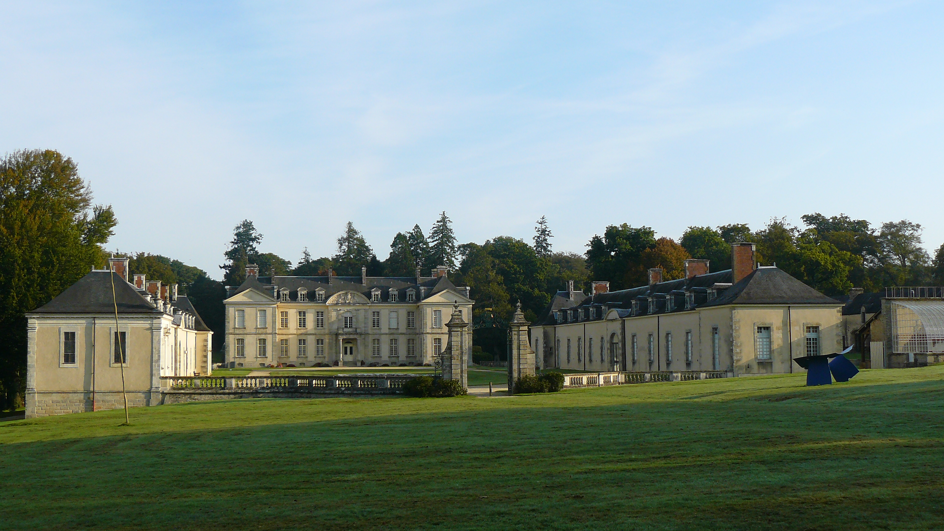 Domaine de Kerguéhennec - Centre d'art Contemporain - situé sur la commune de Bignan 56 FRANCE